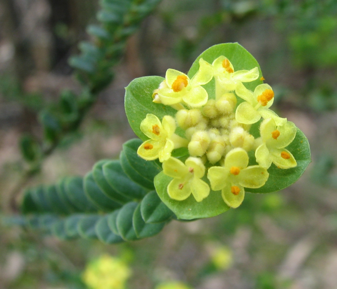 Pimelea flava subsp. flava Belgrave South, Victoria, Australia